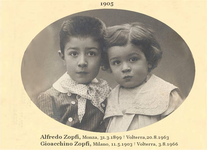 Alfredo Zopfi (Monza, 31.3.1899 - Volterra 20.8.1963) e il fratellino Gioacchino Zopfi (Milano, 11.5.1903 - Volterra 3.8.1966) in una fotografia del 1905, figli dell'industriale Alfredo Zopfi (1864-1924)